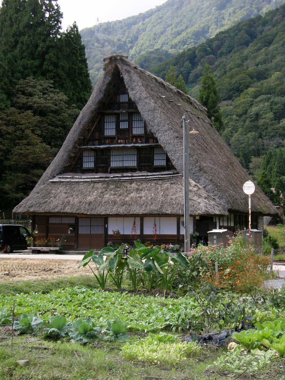 Gokayama Suganuma 五箇山菅沼地区 撮影：松岡明芳